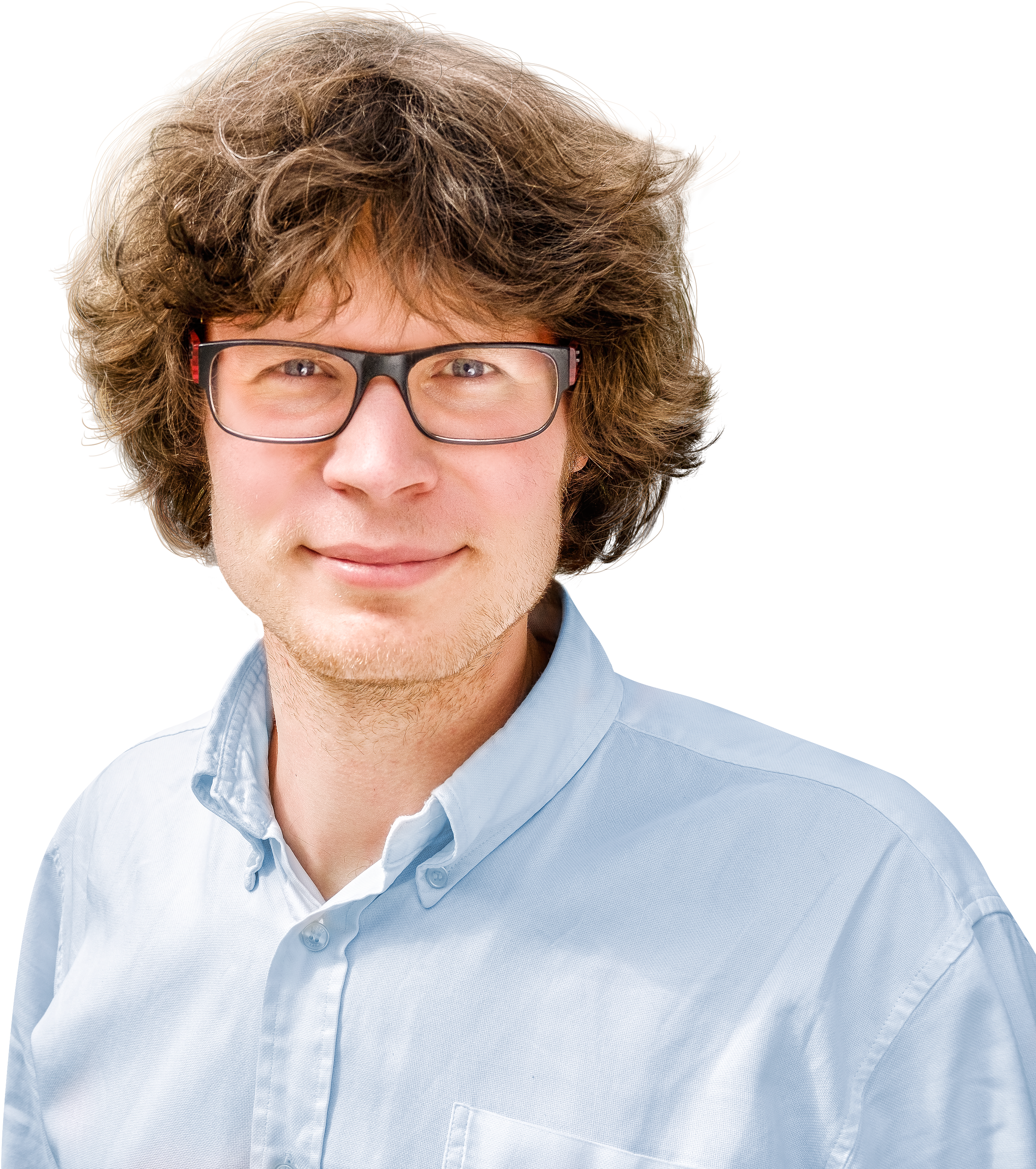 Kampaň v roce 2016